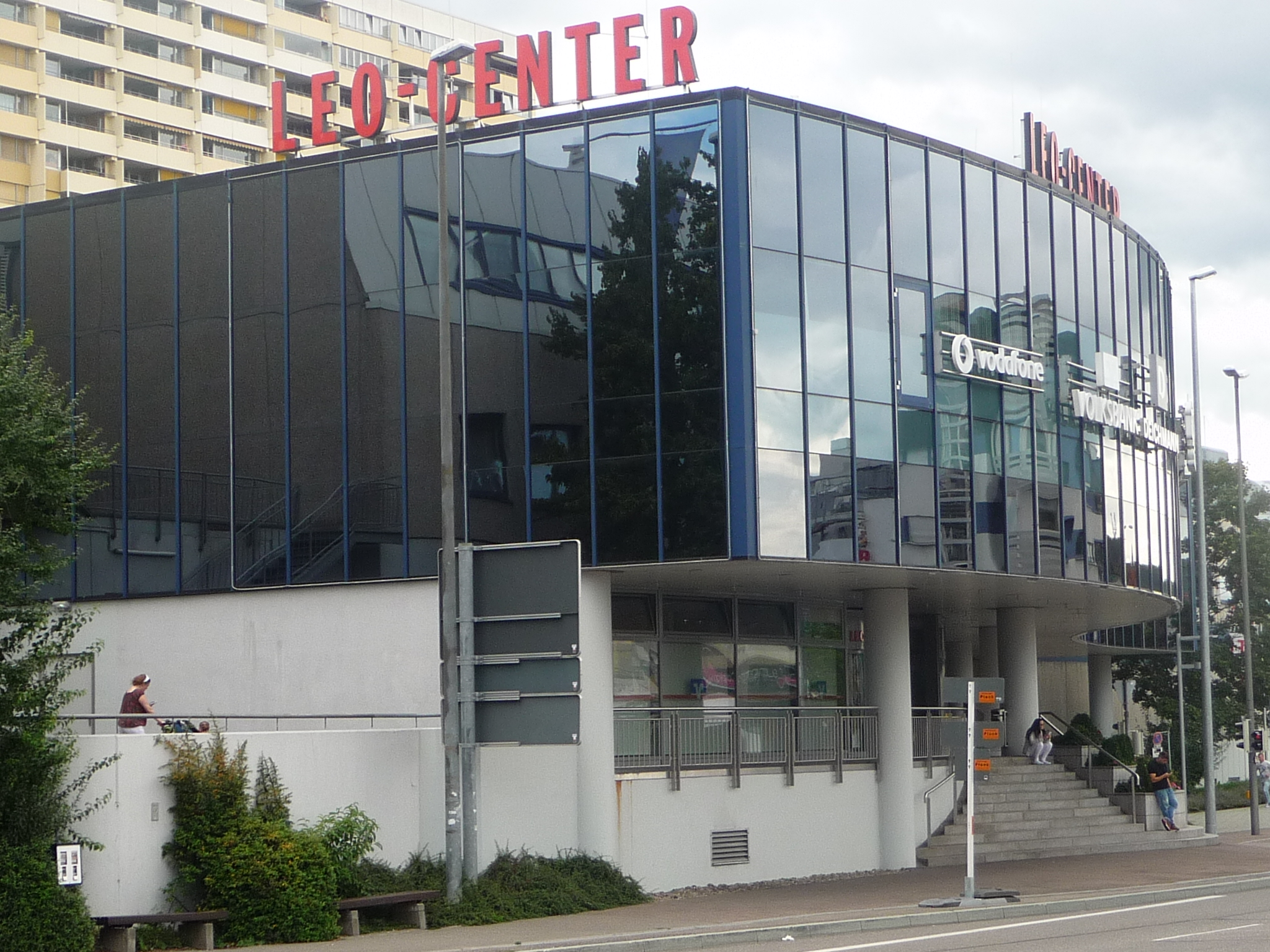 Der Eingang des Leo-Centers in Leonberg am Neuköllner Platz